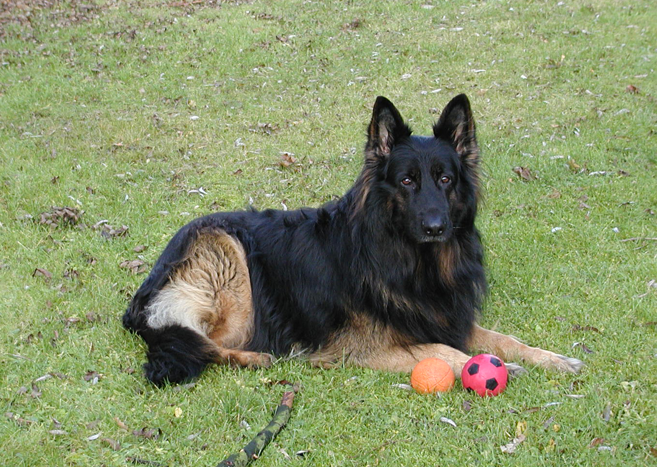 Unser Altdeutscher Schäferhund Shadow † Oktober 2007